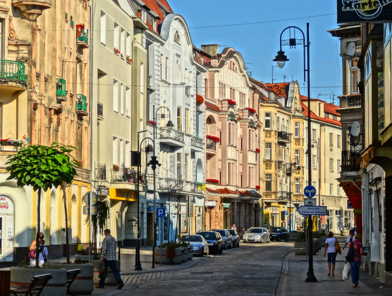 Ulica Dworcowa w Bydgoszczy na odcinku od ul. Warmińskiego do ul. Królowej Jadwigi